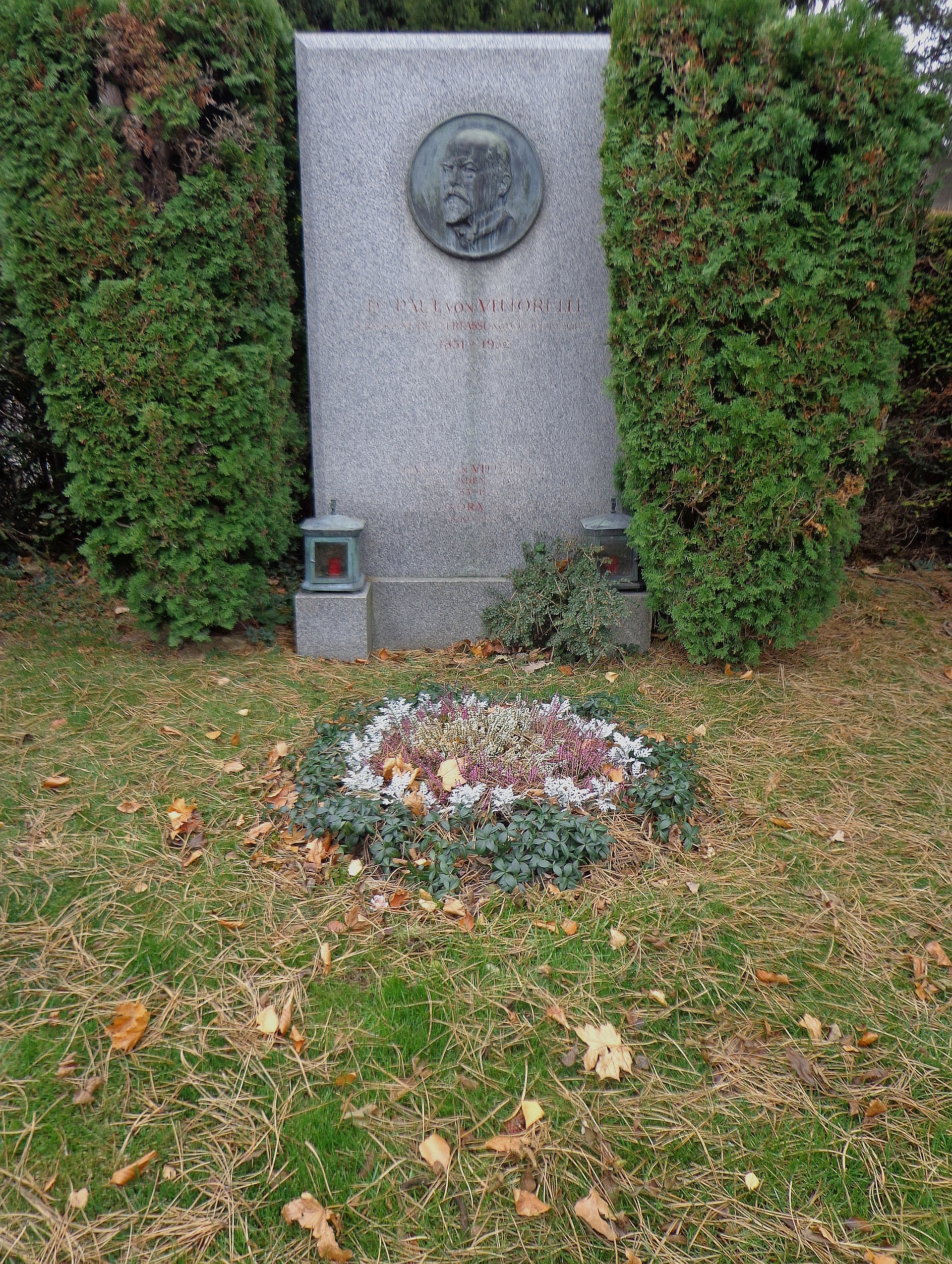 Wiener Zentralfriedhof - Gruppe 14 C, Ehrengrab von Paul von Vittorelli